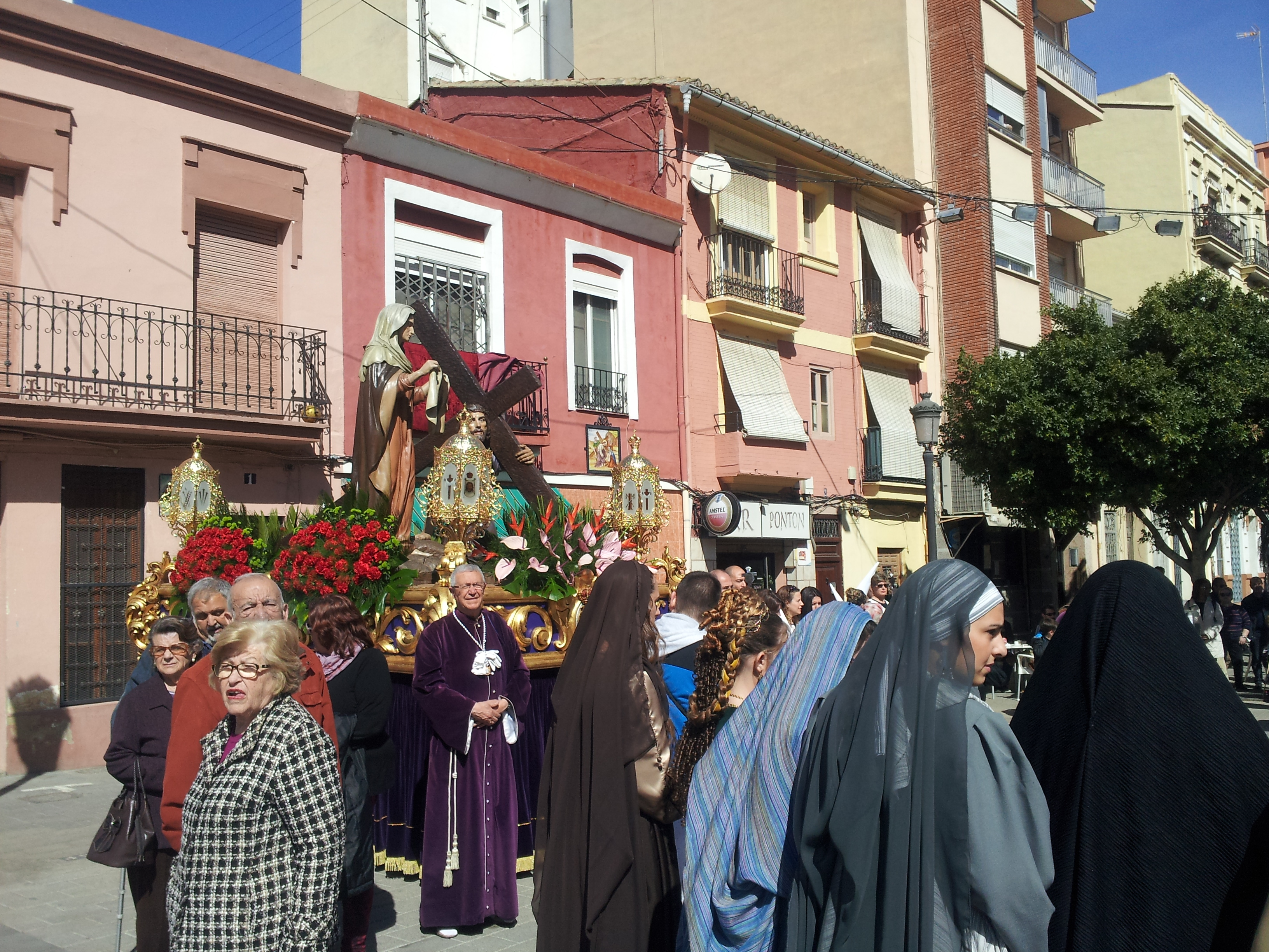 Setmana santa marinera, 2016.